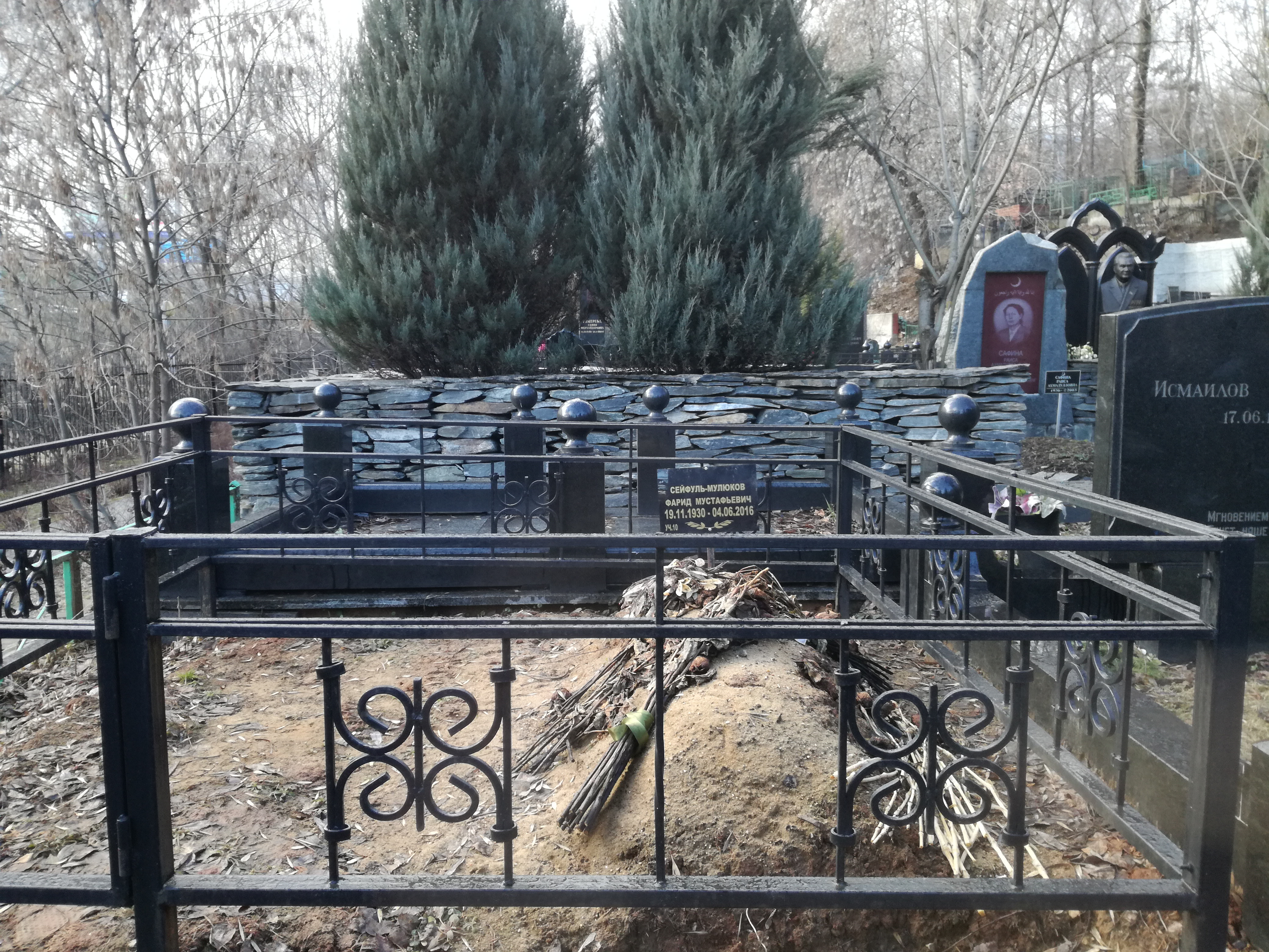 Даниловское кладбище